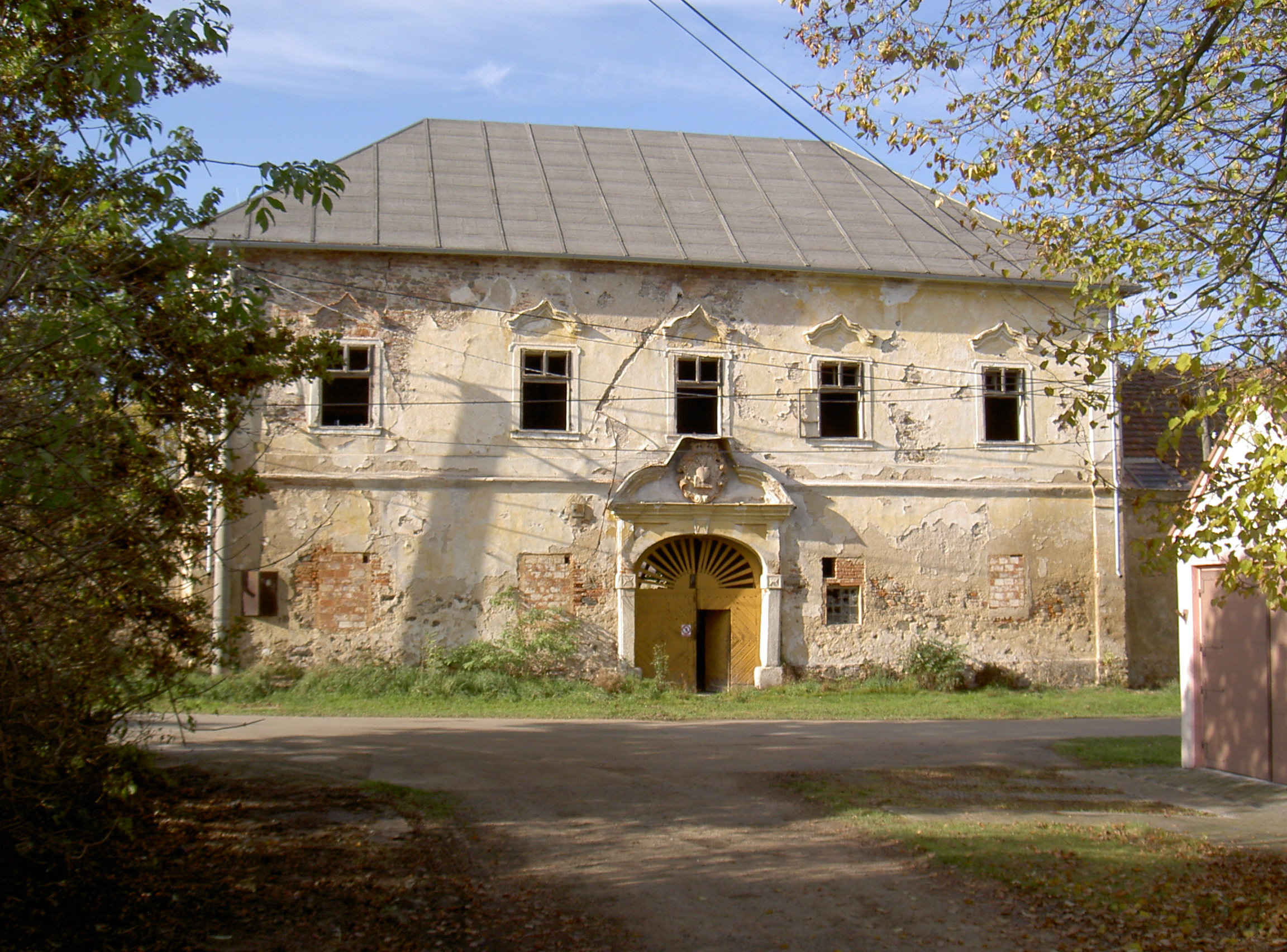 Schloss in Ždánov (okres Domažlice), ehemals zum Augustinerkloster Pivoň gehörig